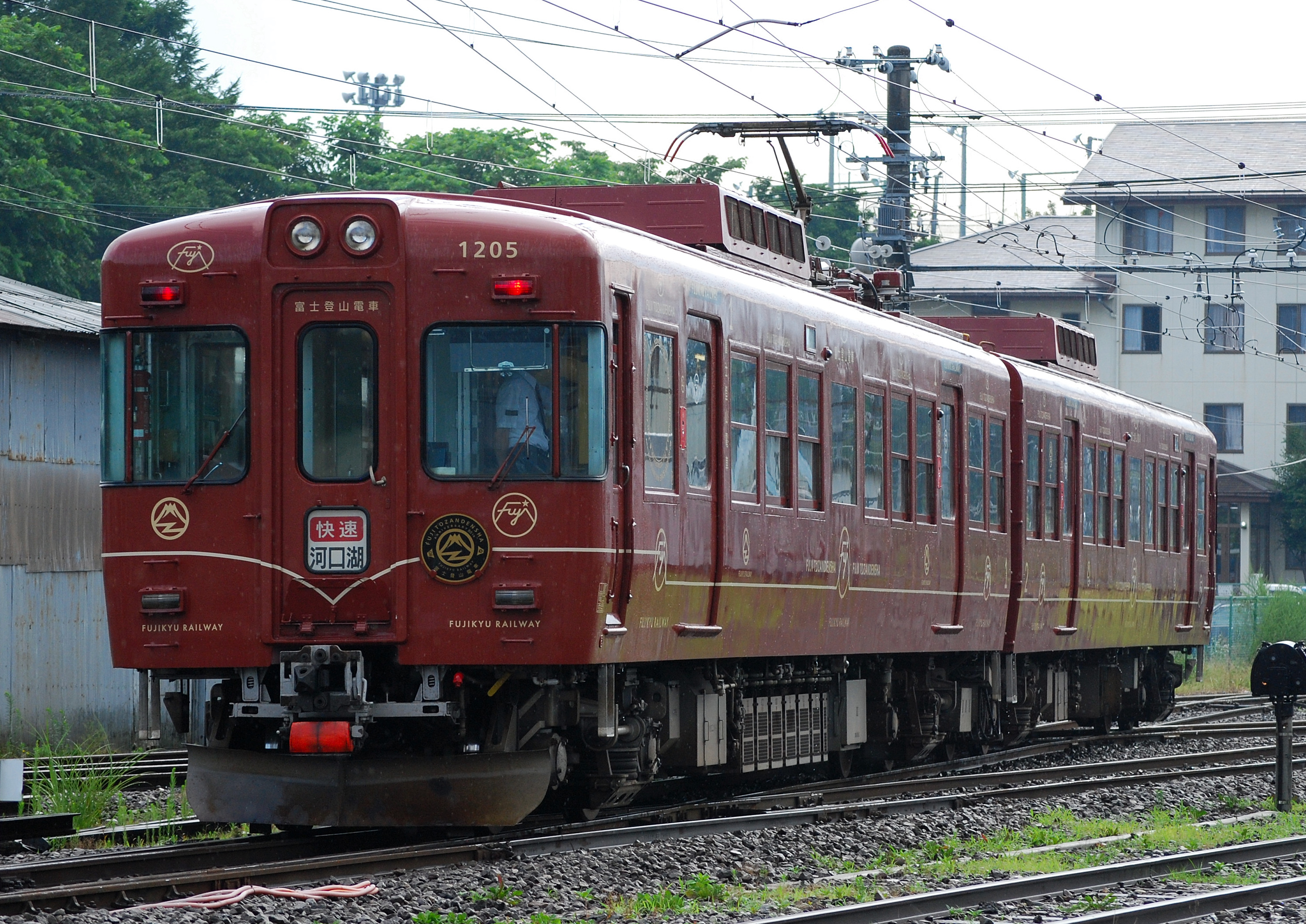 富士急行1000形 富士登山電車